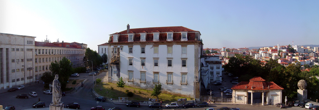 Colégio de São Jerónimo, antigo hospital da Universidade de Coimbra